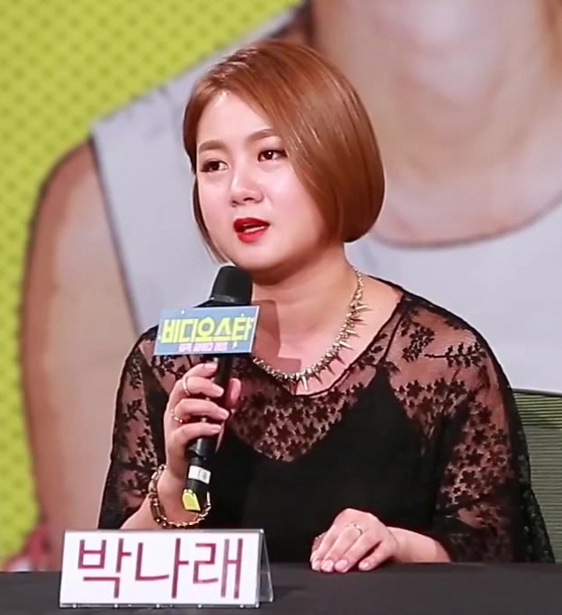 (TV TEN) MBC에브리원 비디오스타 - 박보검이 박나래의 미끼를 물었다 (press conference - not main tv program)